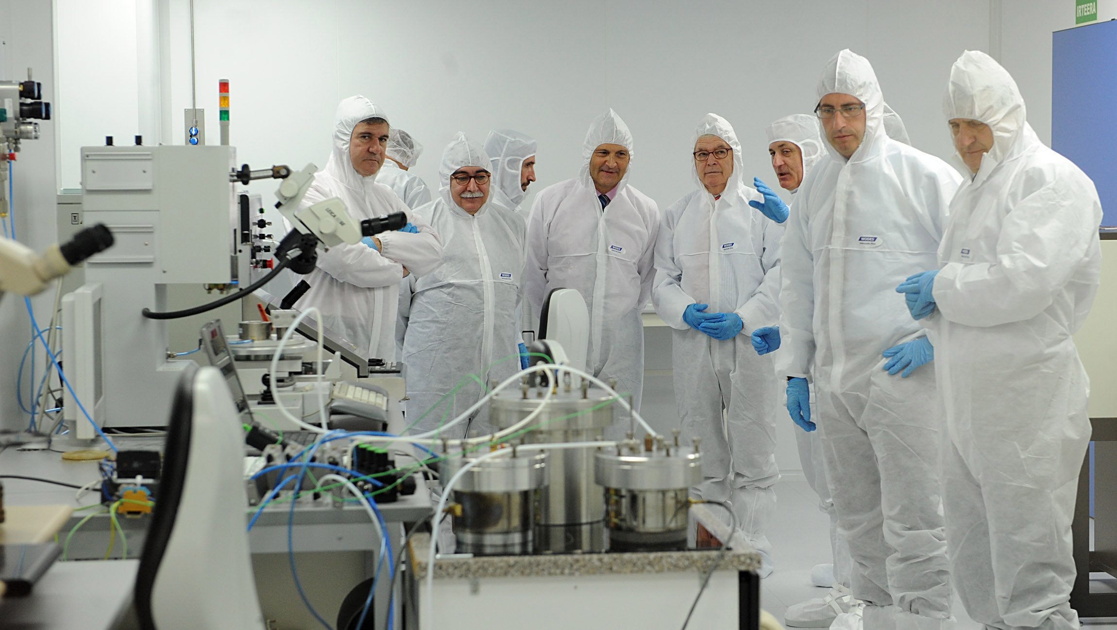 Inauguración del nuevo laboratorio de nanotecnología de Ikerlan IK-4 en el Polo Garaia. El acto contó con la presencia del piputado general Markel Olano, el secretario de estado para Investigación, Carlos Martínez, el presidente del Consejo General de MONDRAGON, José María Aldecoa y el consejero de Industria, Bernabé Unda, entre otros.